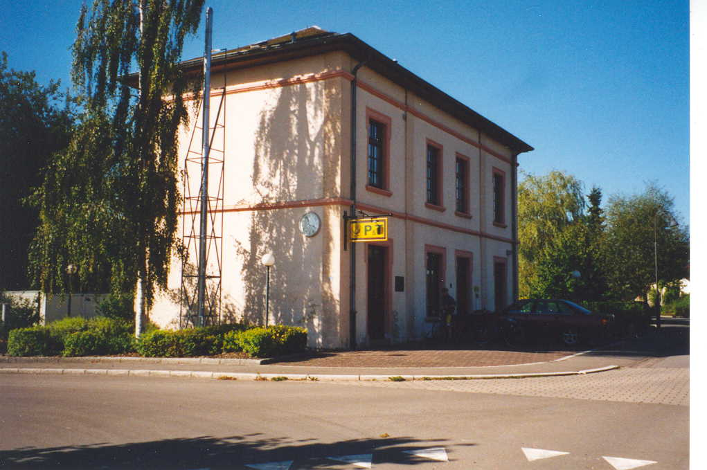 Bahnhof Noerdingen an der Attertlinie